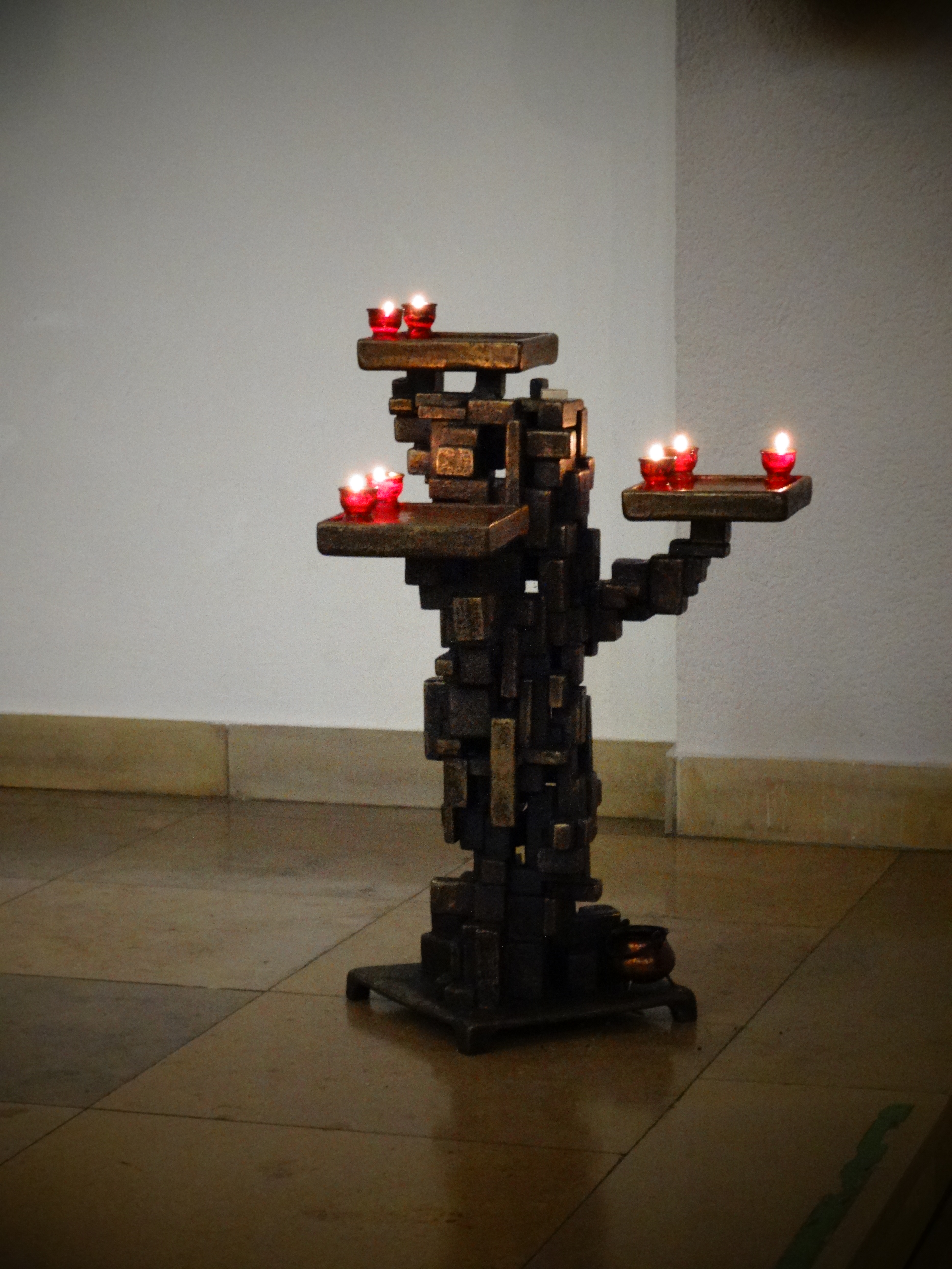 St.-Konrad-Kirche (Hof) Kerzenleuchter